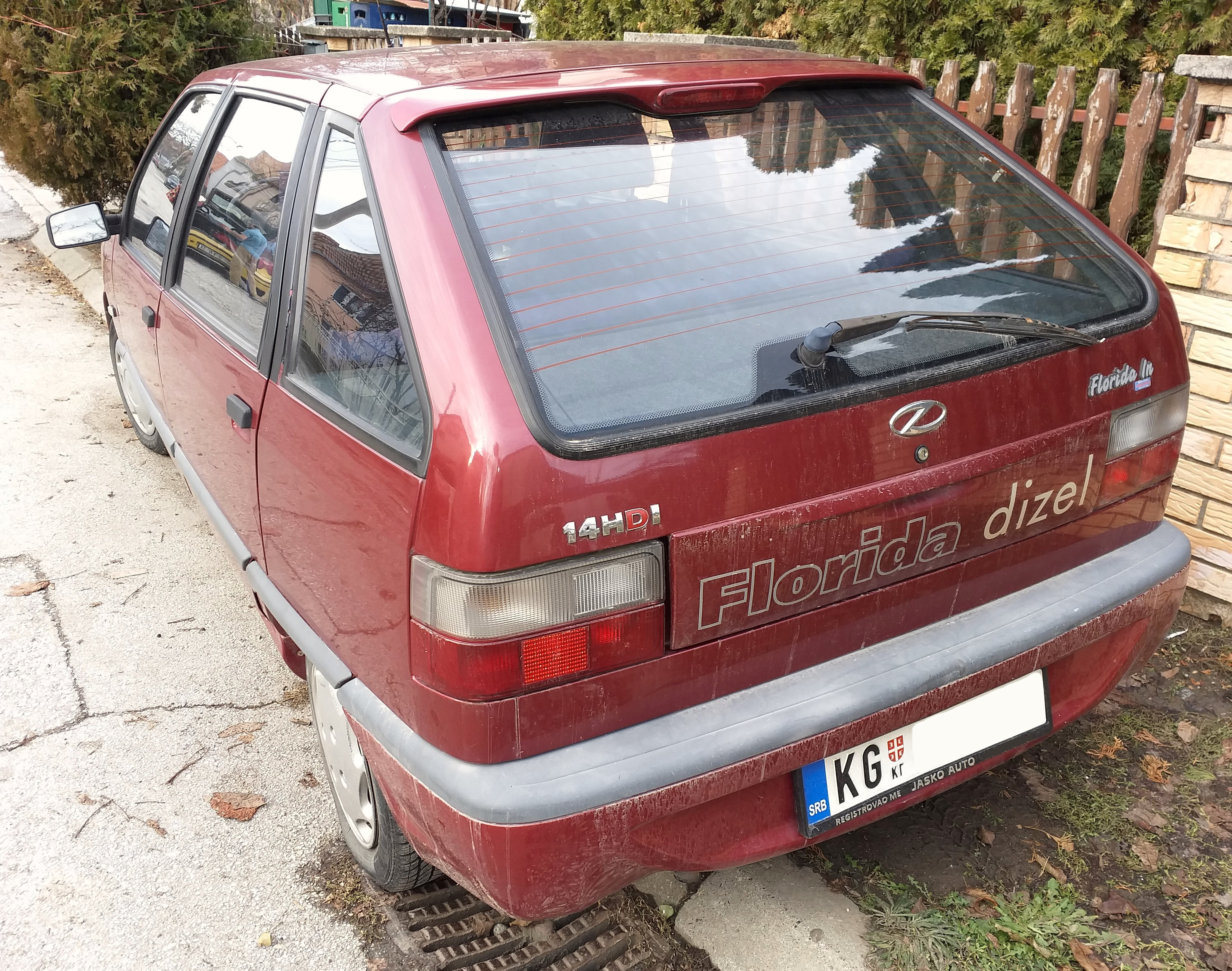 Srpski (latinica): Застава Флорида Ин Л са 1.4 ПСА дизел мотором са 68 КС.